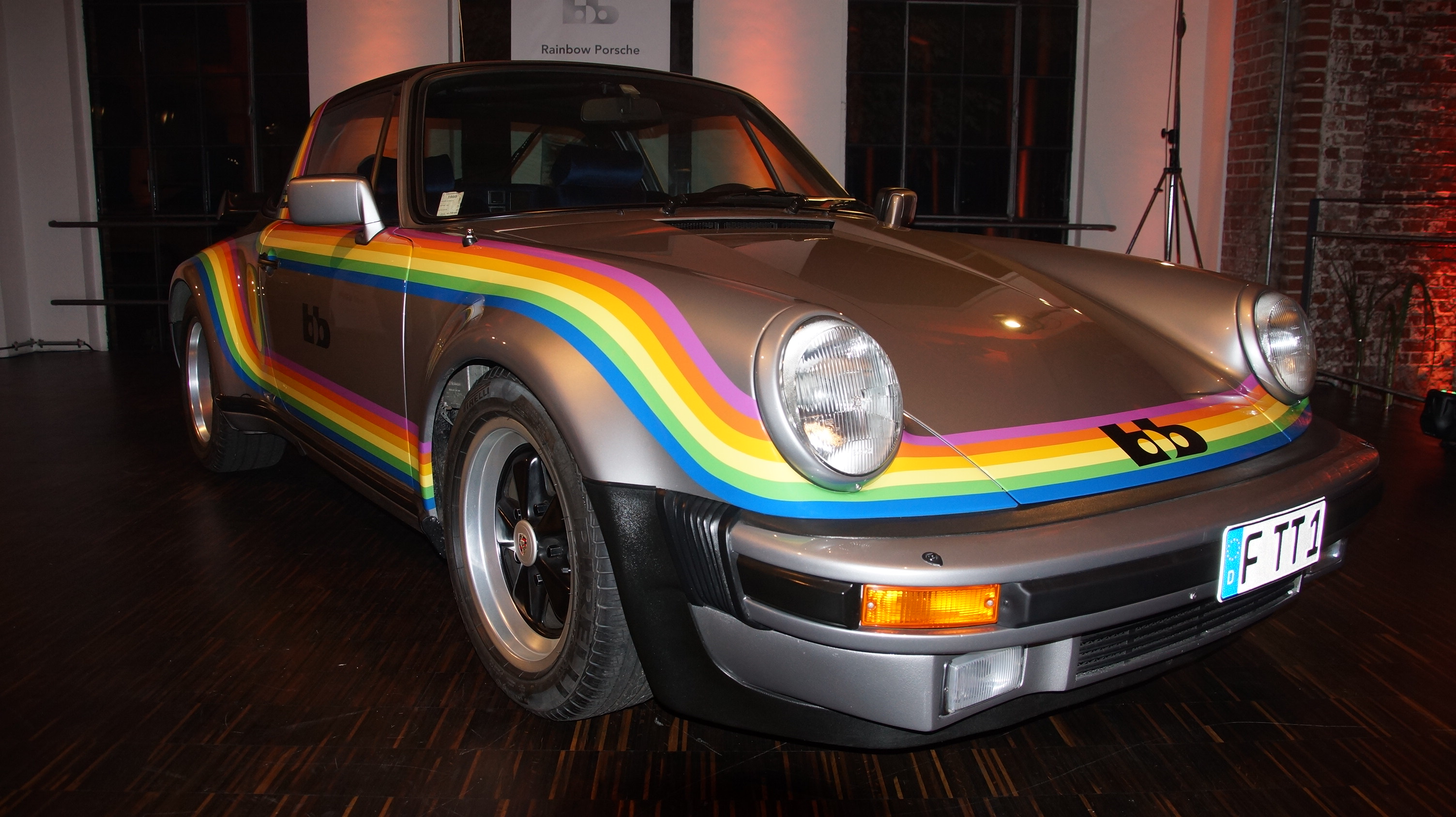 bb Rainbow Porsche Turbo Targa F TT 1 bei der Enthüllung des bb Moonracer in der Klassikstadt Frankfurt am 20.-21. September 2014